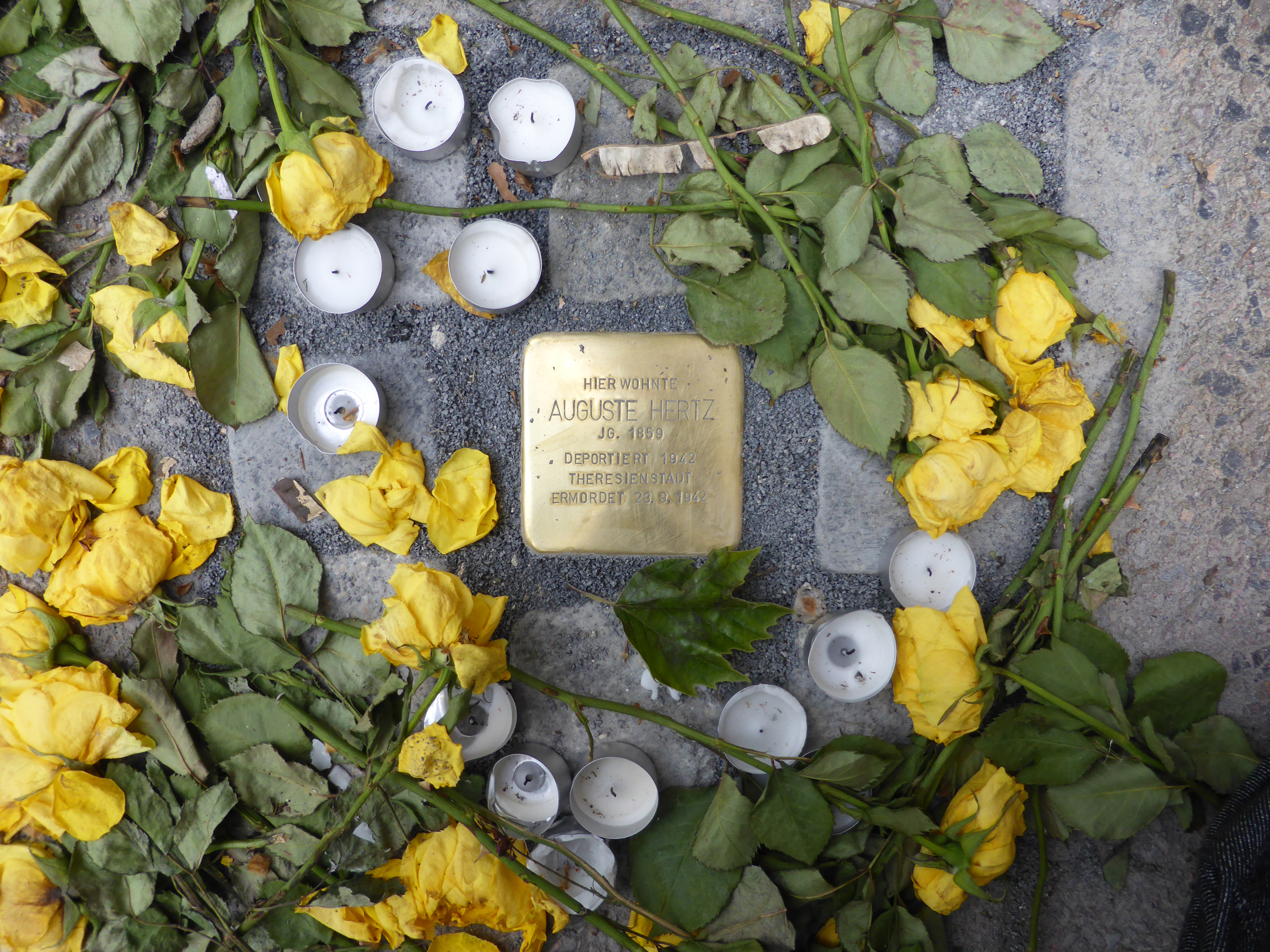 Stolperstein: Verlegestelle Nordwall 80, Krefeld.